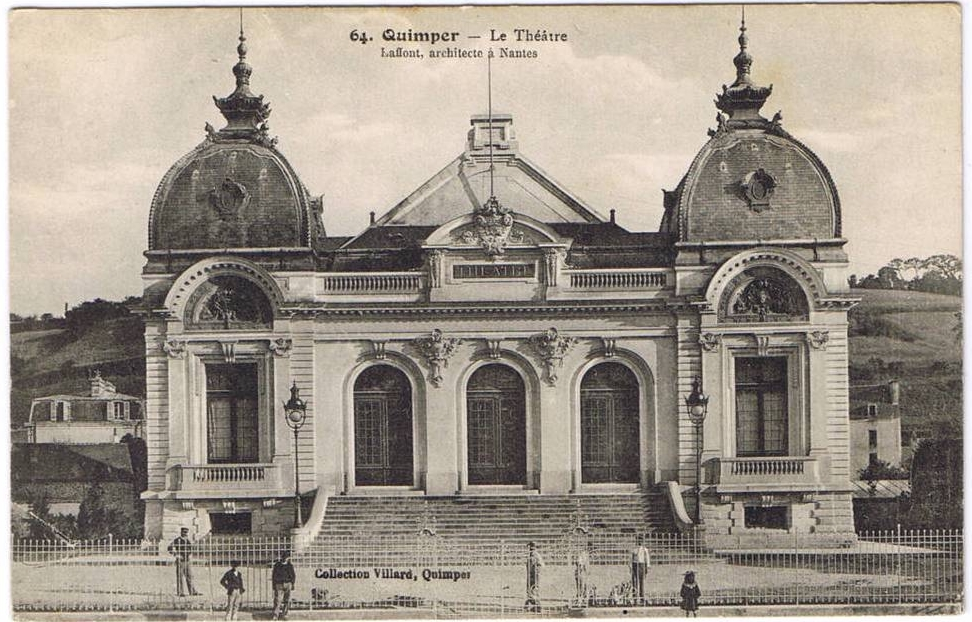 Le Théatre municipal de Quimper construit en 1904 et dont les décors de scène ont été rénovés et complétés en décembre 1932 par le Peintre Léon Broquet